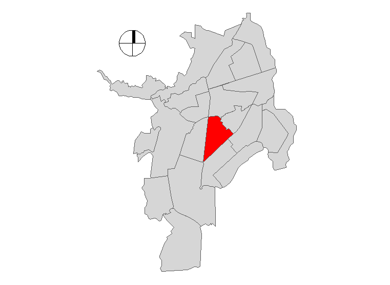 Comuna 11 de Santiago de Cali, Colombia.